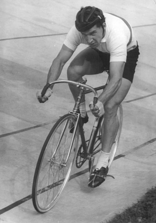 Heinz Wahl Zentralbild Funck 26.7.1956 DDR-Meisterschaften im Bahnfahren In der Zeit vom 22.7.1956 28.7.1956 finden in Berlin-Weissensee die Titelkämpfe der Bahnfahrer der DDR statt. In der Meisterschaft im 1000 m Zeitfahren der Junioren siegte der Karl-Marx-Städter Helmut Lehmann in der Zeit von 1:13,4 Min. UBz:Heinz Wahl (Einheit Berlin) konnte nur den 3.Platz belegen.